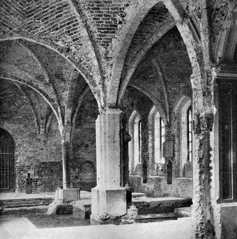 Helligåndskirken, Copenhagen, Denmark. Helligaandshuset, exhibition hall during renovation in 1895.